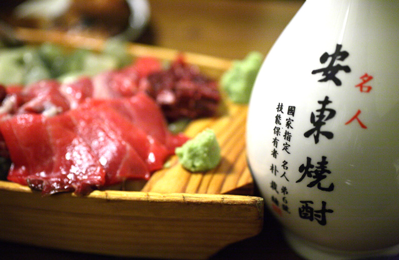 안동소주 제품 사진. 박재서 명인의 안동소주